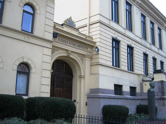 *Dat Osloer Nobel-Institut Foto (aus de "Commons") vum Bjørn Erik Pedersen